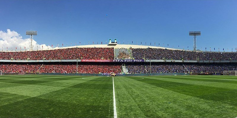 تصاویر تسنیم از شهرآورد هشتاد و ششم تهران